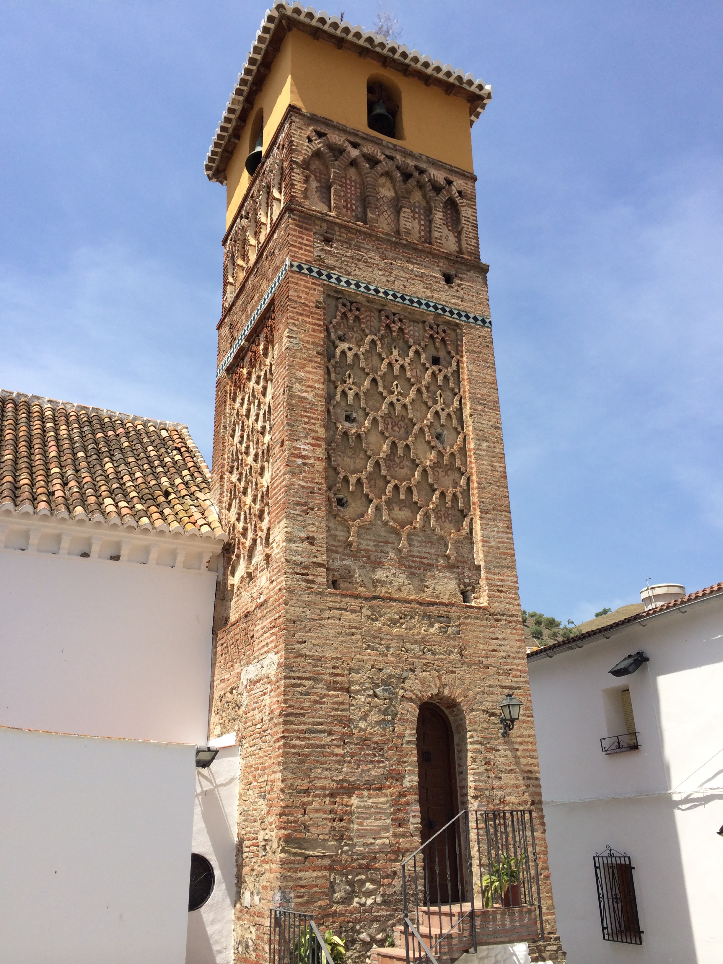 Alminar